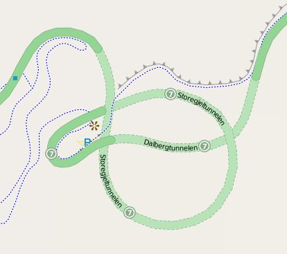 Storegjeltunnelen på riksvei 7